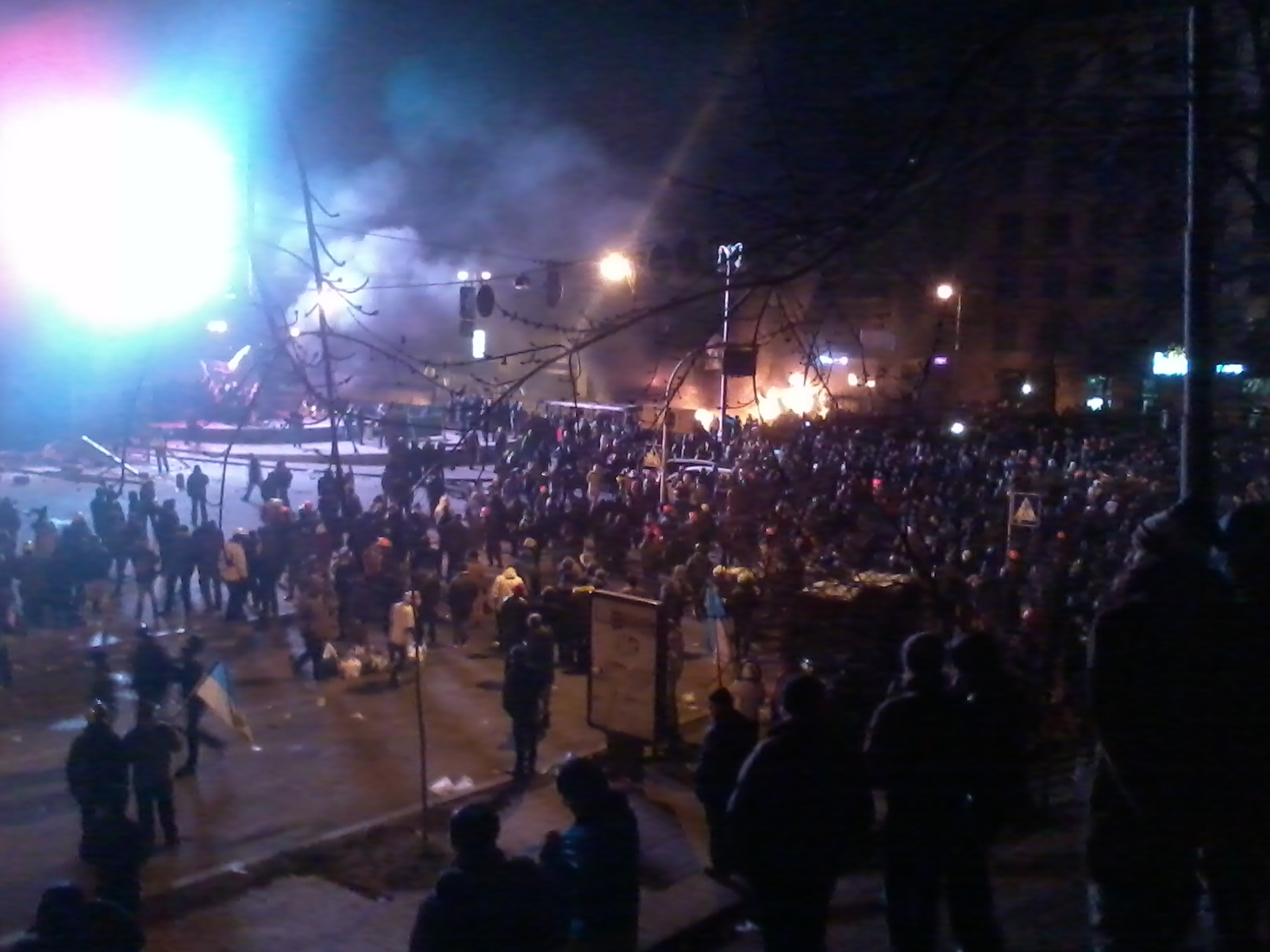 Штурм біля стадіону імені Лобановського